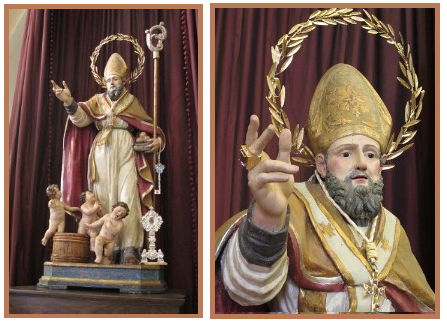 San Nicola di Bari, benedicente